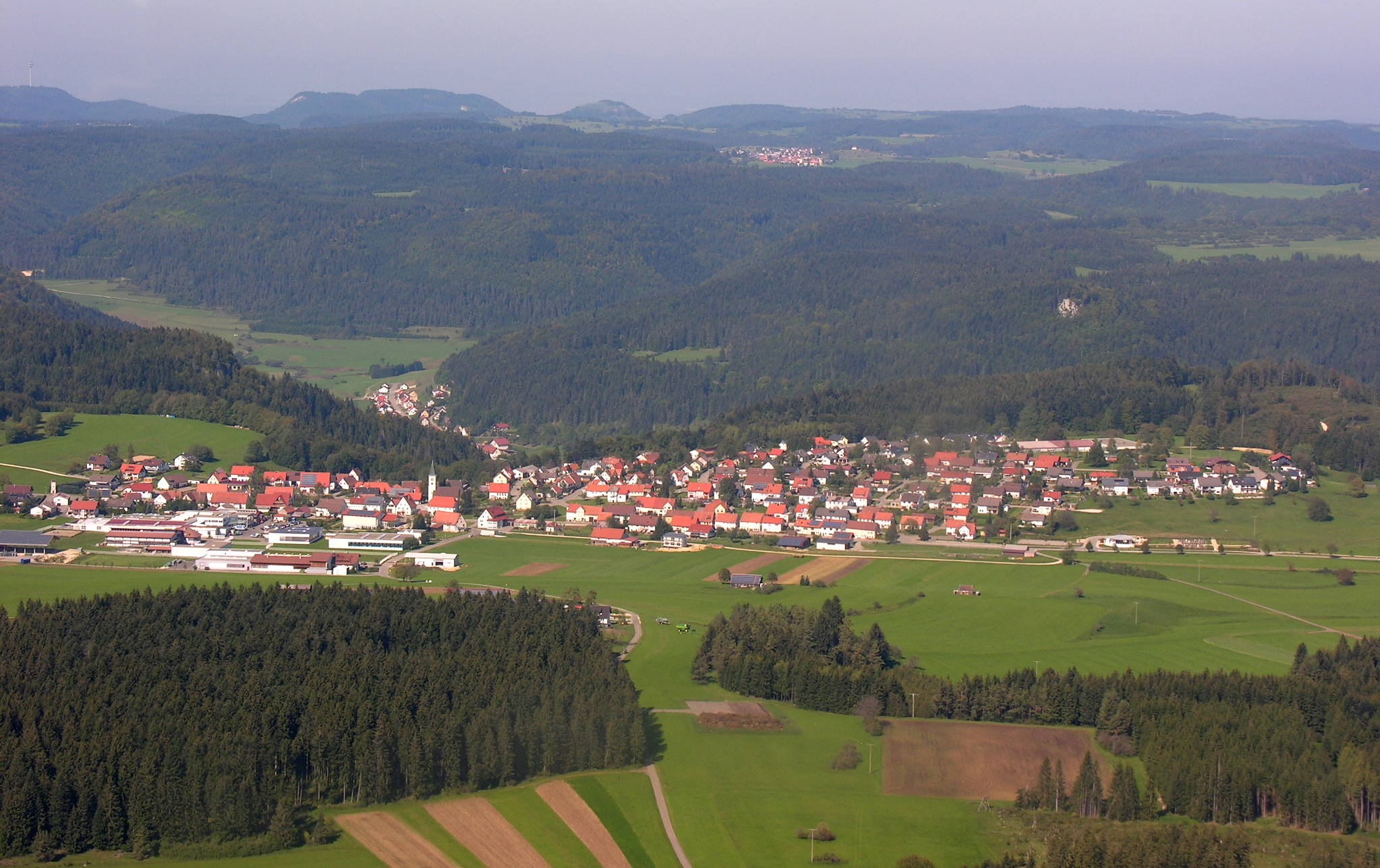 Germany, Baden-Württemberg, Aerial view of Königsheim